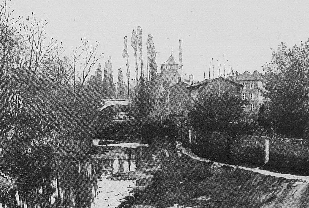 Dictionnaire illustré des communes du département du Rhône. Tome 1 / par MM. E. de Rolland et D. Clouzet.